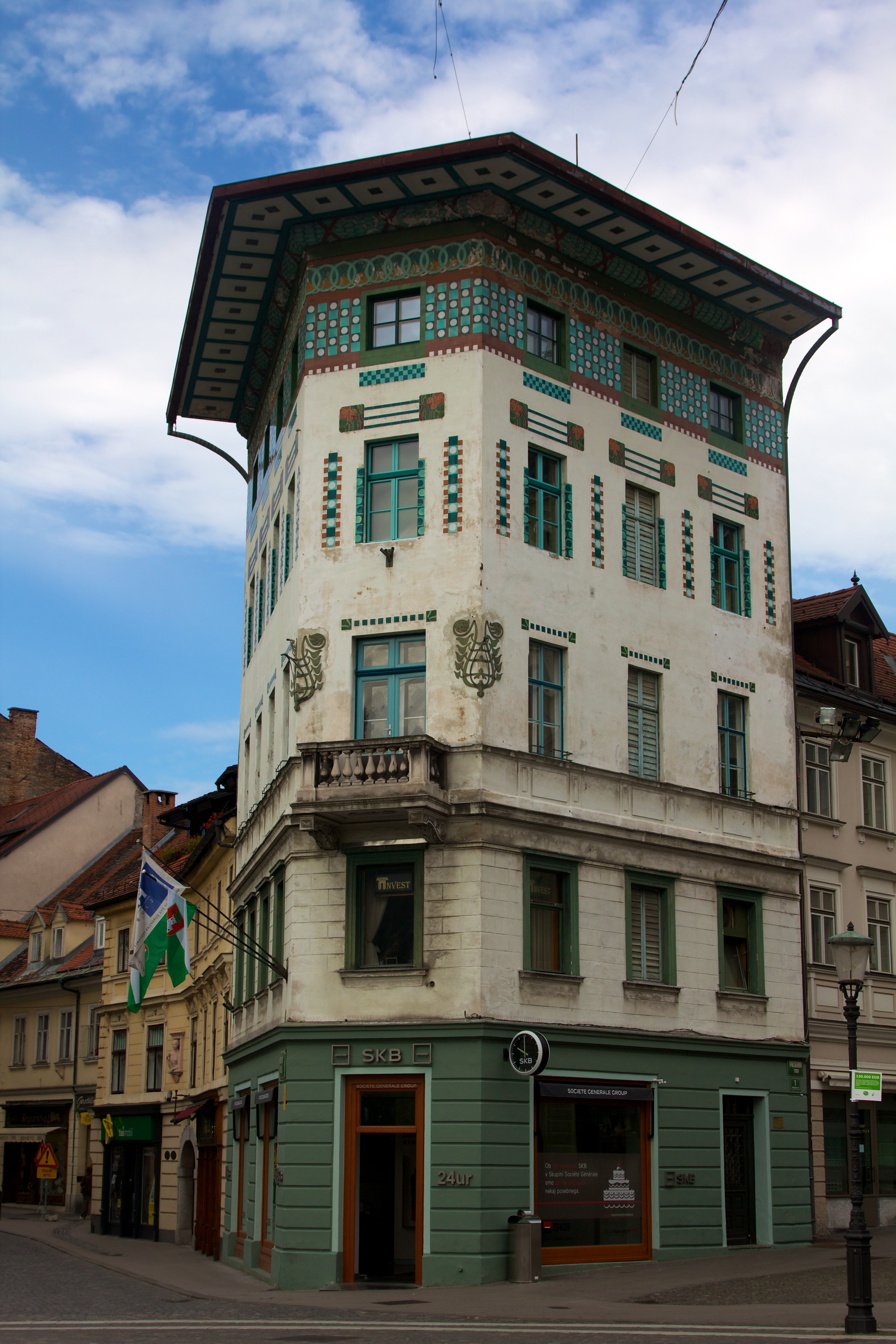 Prešeren Square 002